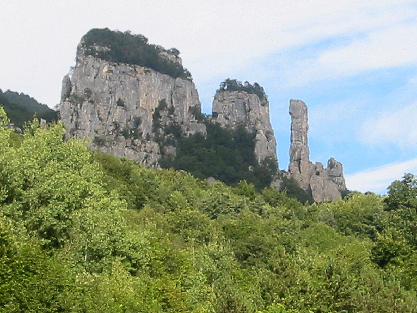 Tours Saint-Jacques, Haute-Savoie, France.